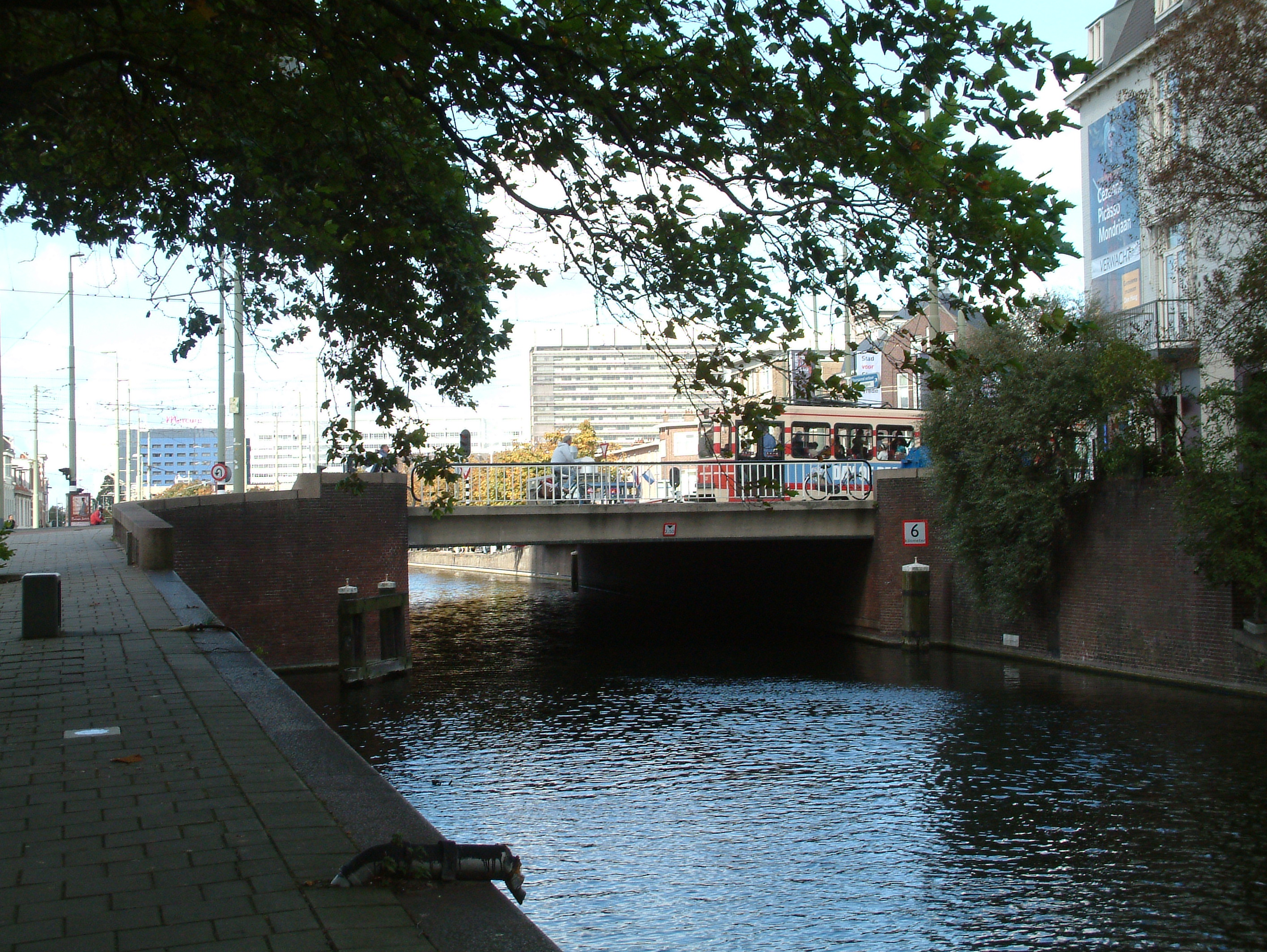 Brug in Den Haag